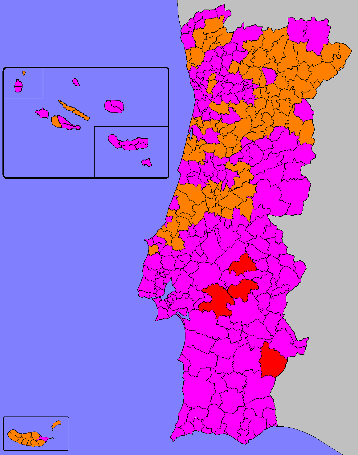 Mapa ilustrativo do partido mais votado por Concelho